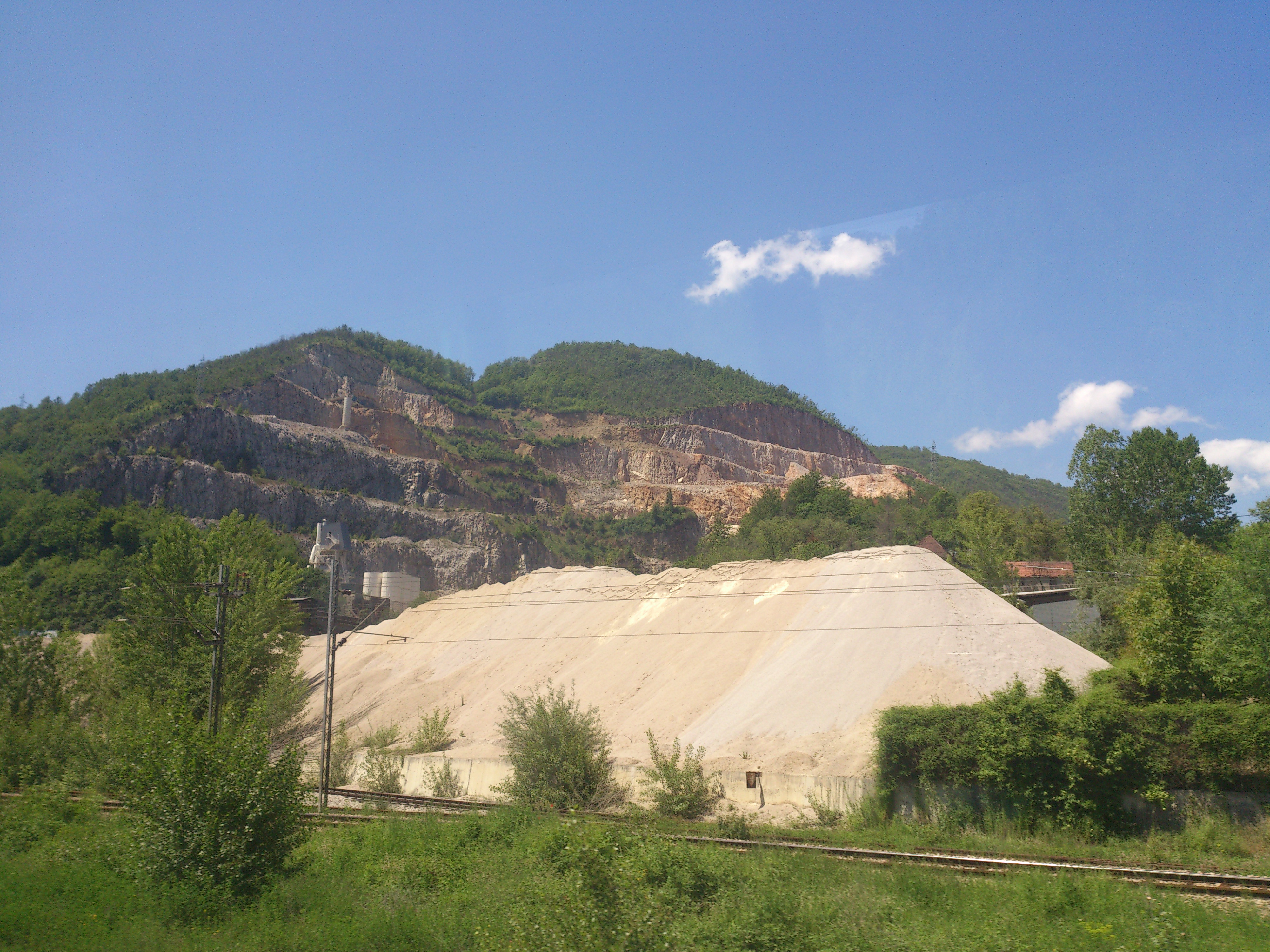 Pogled na veliku fabriku građevinskog materijala (kreča i kamena).